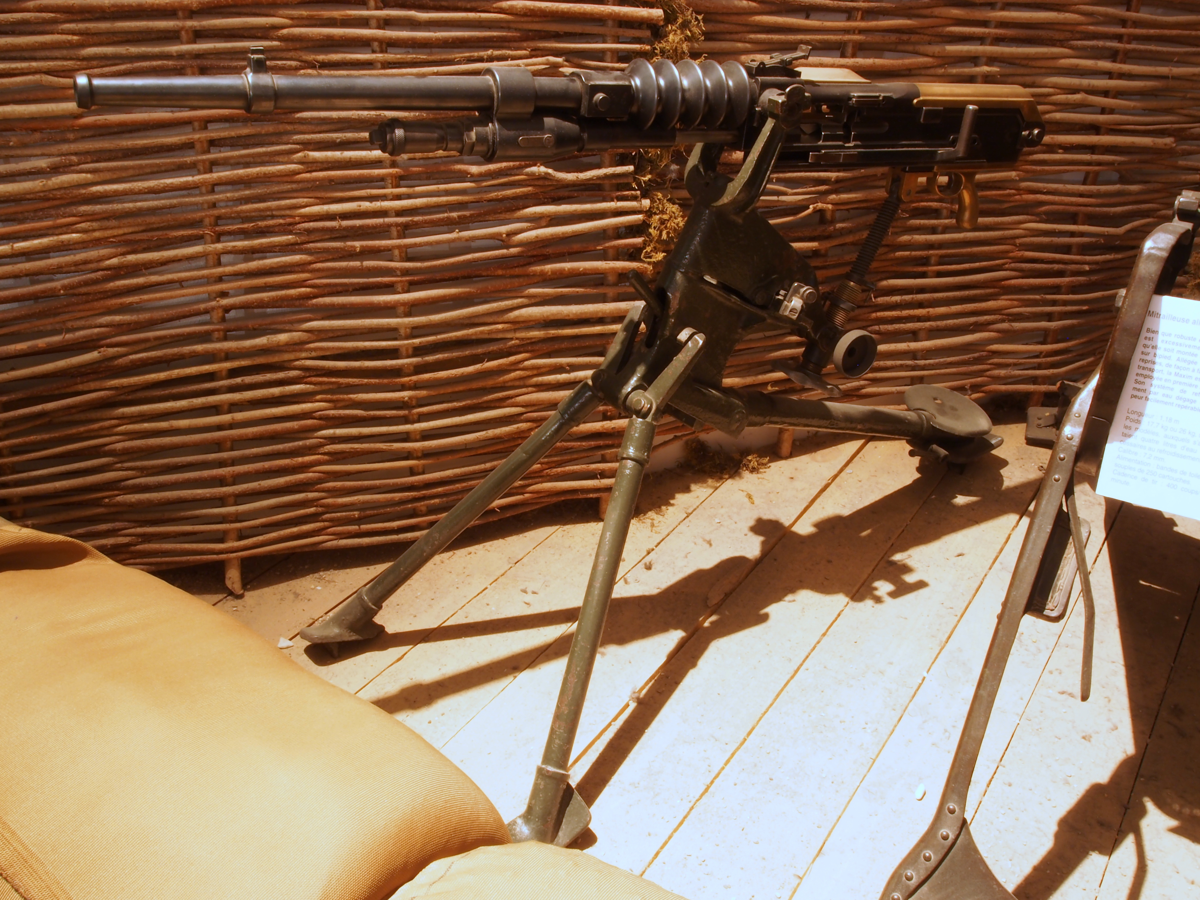 Mitrailleuse francaise Hotchkiss modele 1916